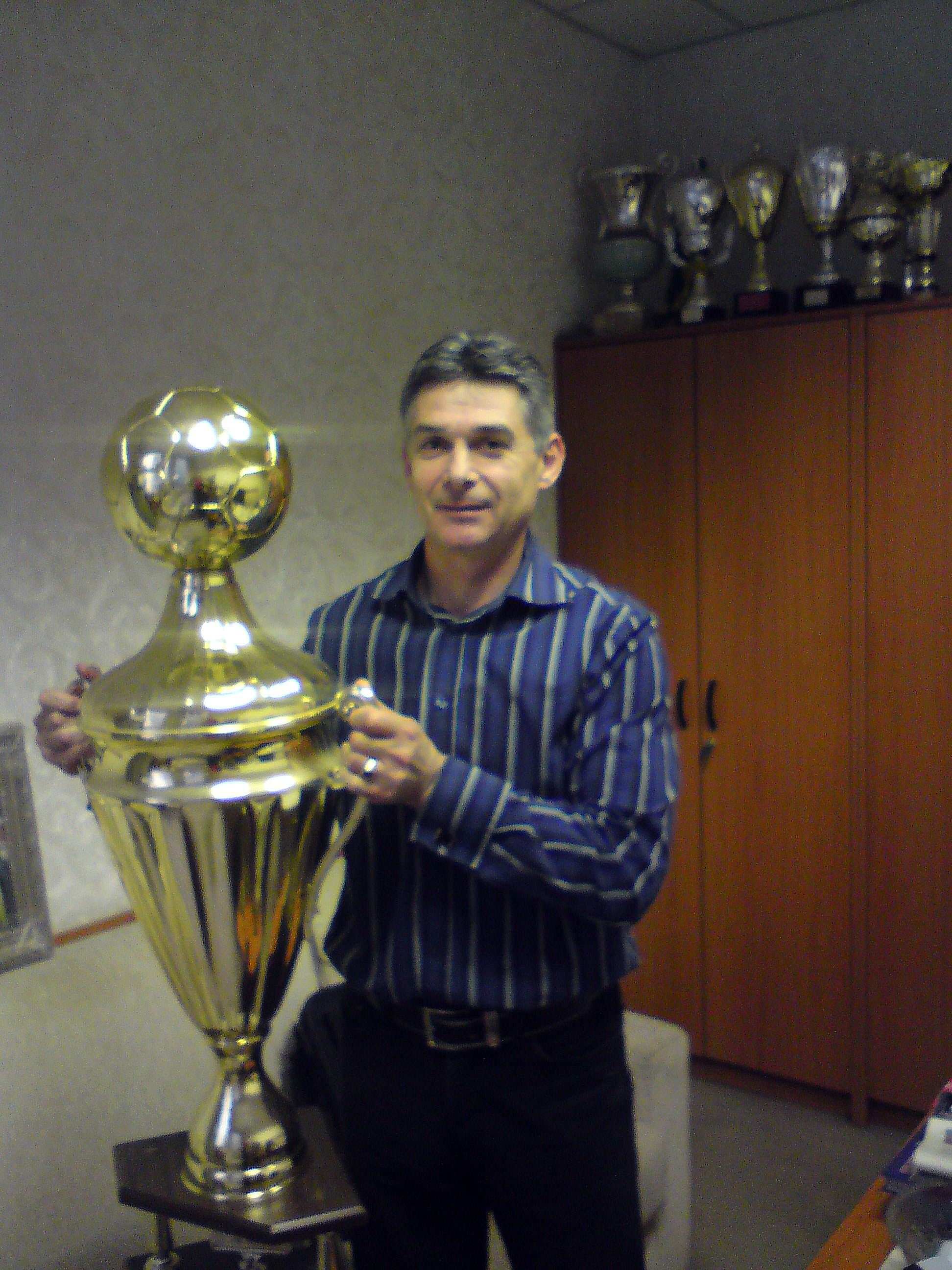 Венцислав Рангелов - бивш треньор на националният полицейски тим по футбол, с купата на Европейски полицейски шампион по футбол.